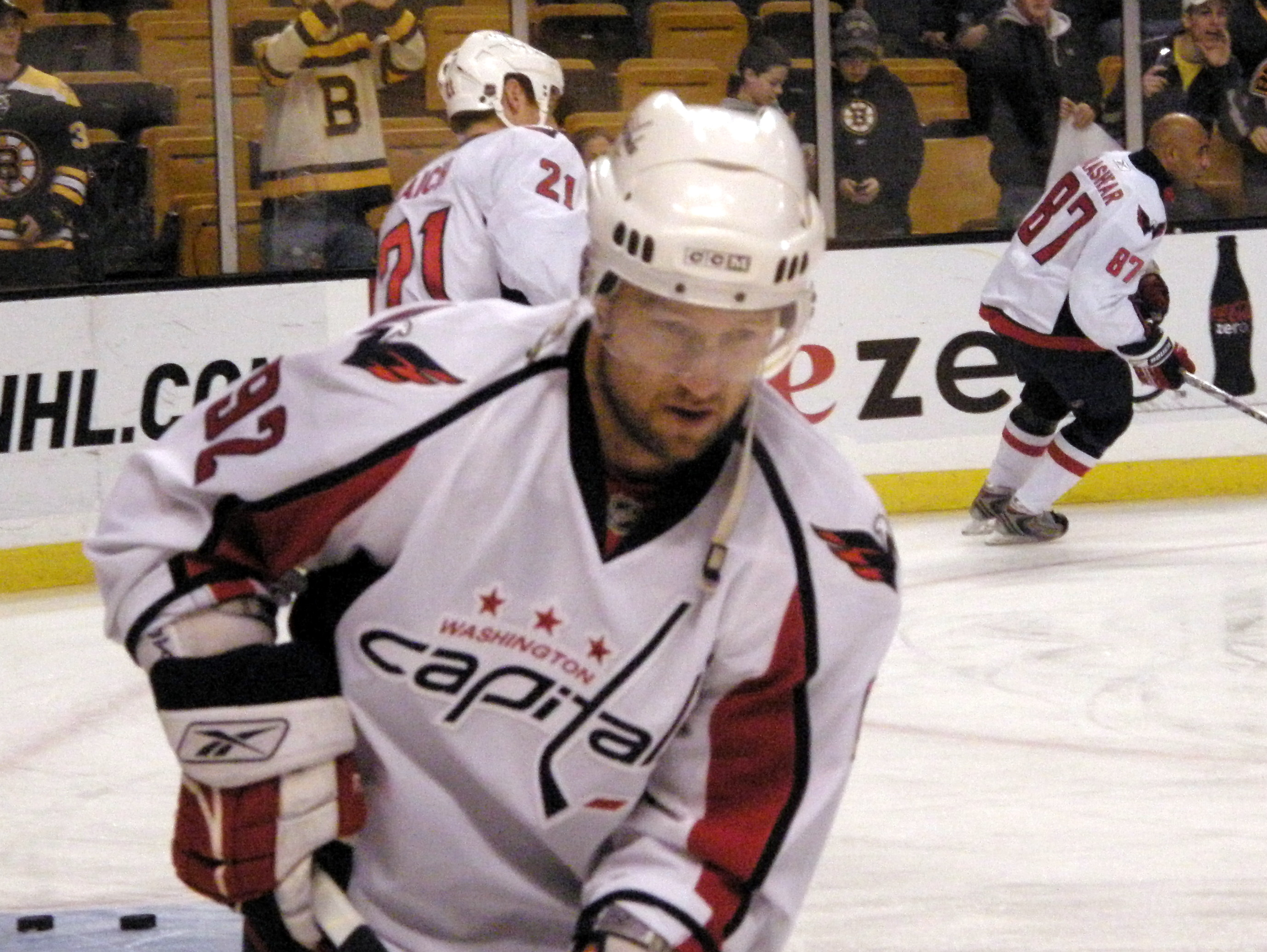 92 Michael Nylander